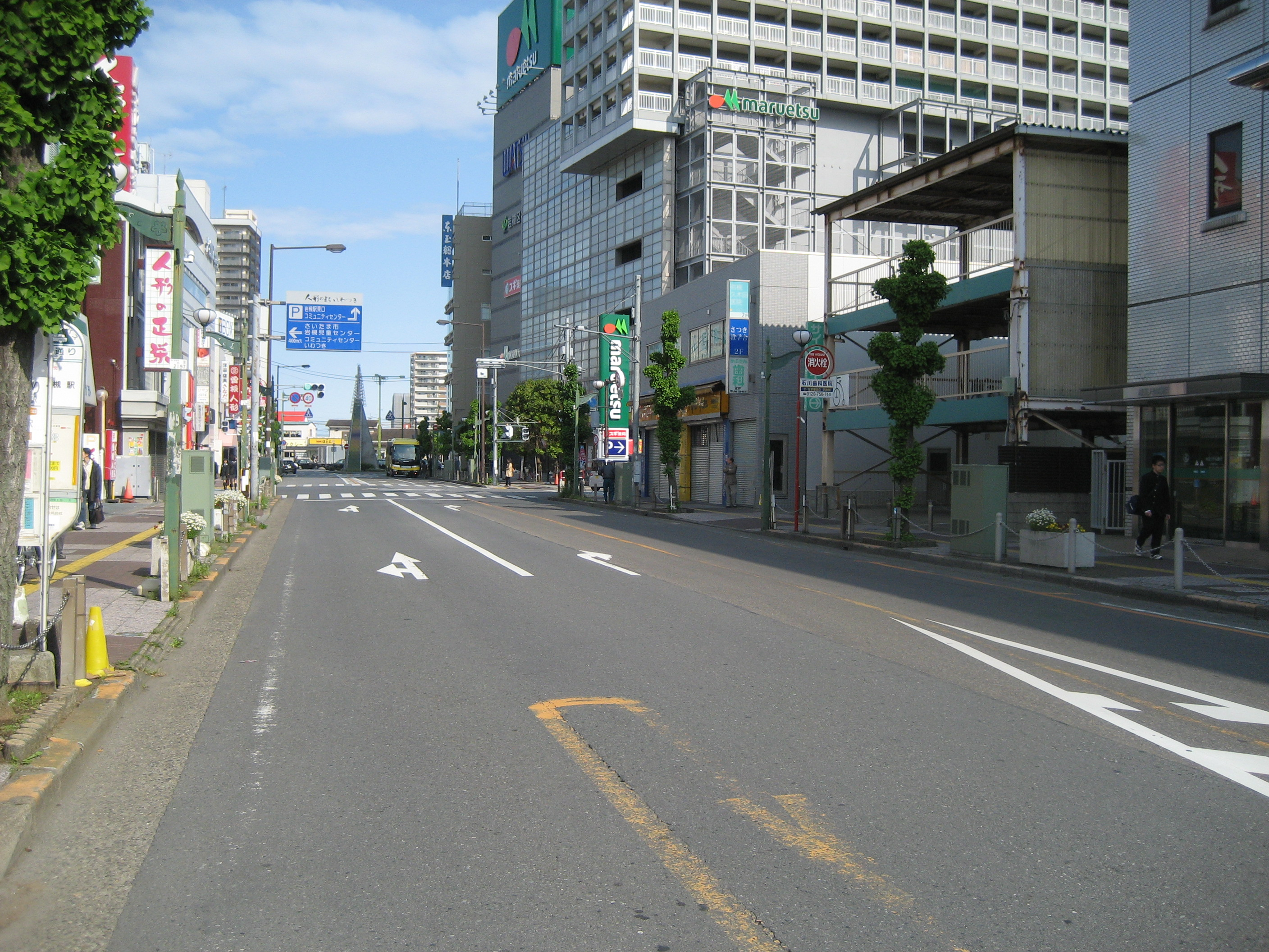 埼玉県道399号線さいたま市岩槻区岩槻駅付近